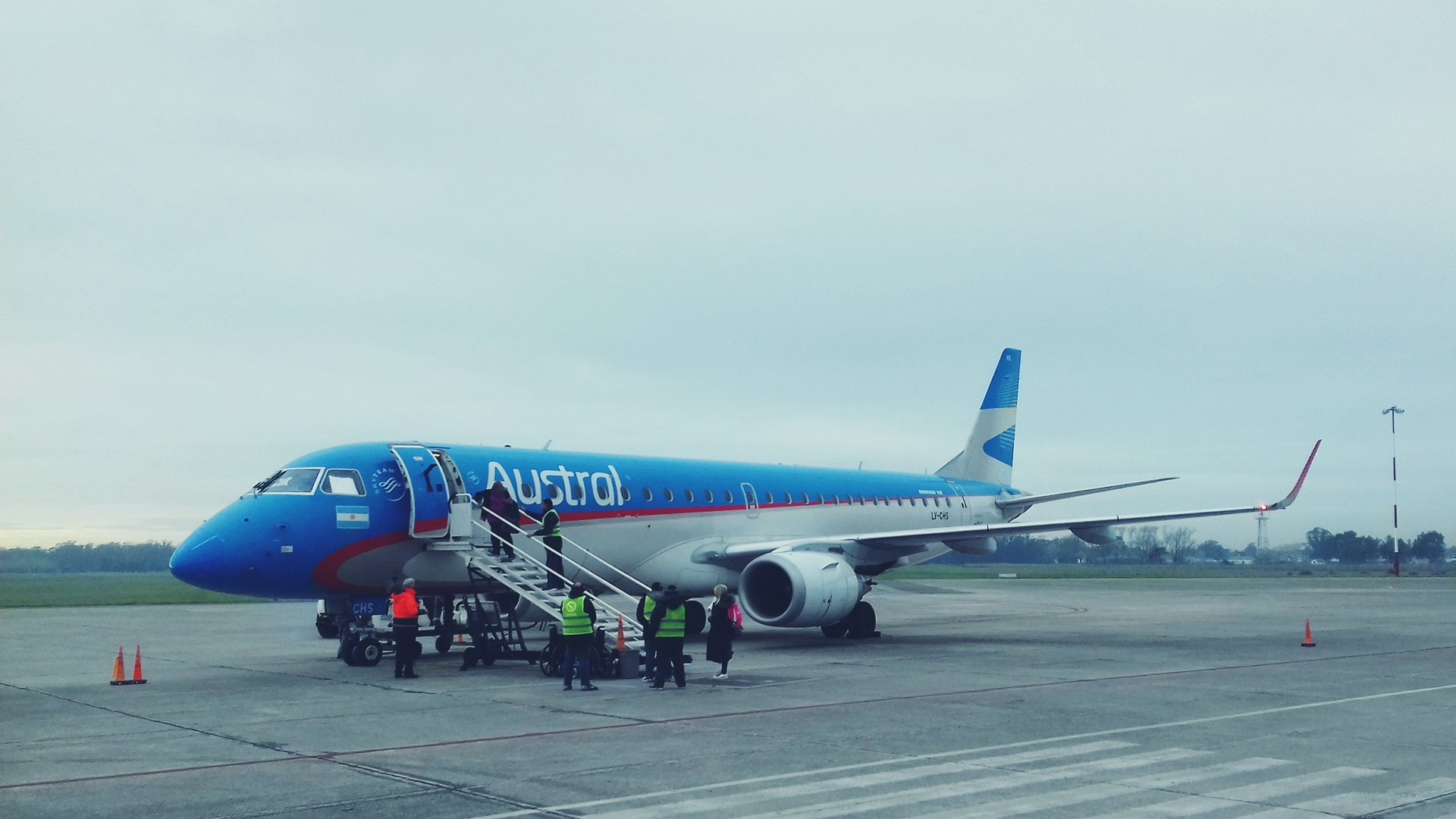 Embraer 190 de Austral Lineas Aereas en el Aeropuerto de Mar del Plata - 1 de Agosto 2017. Argentina.